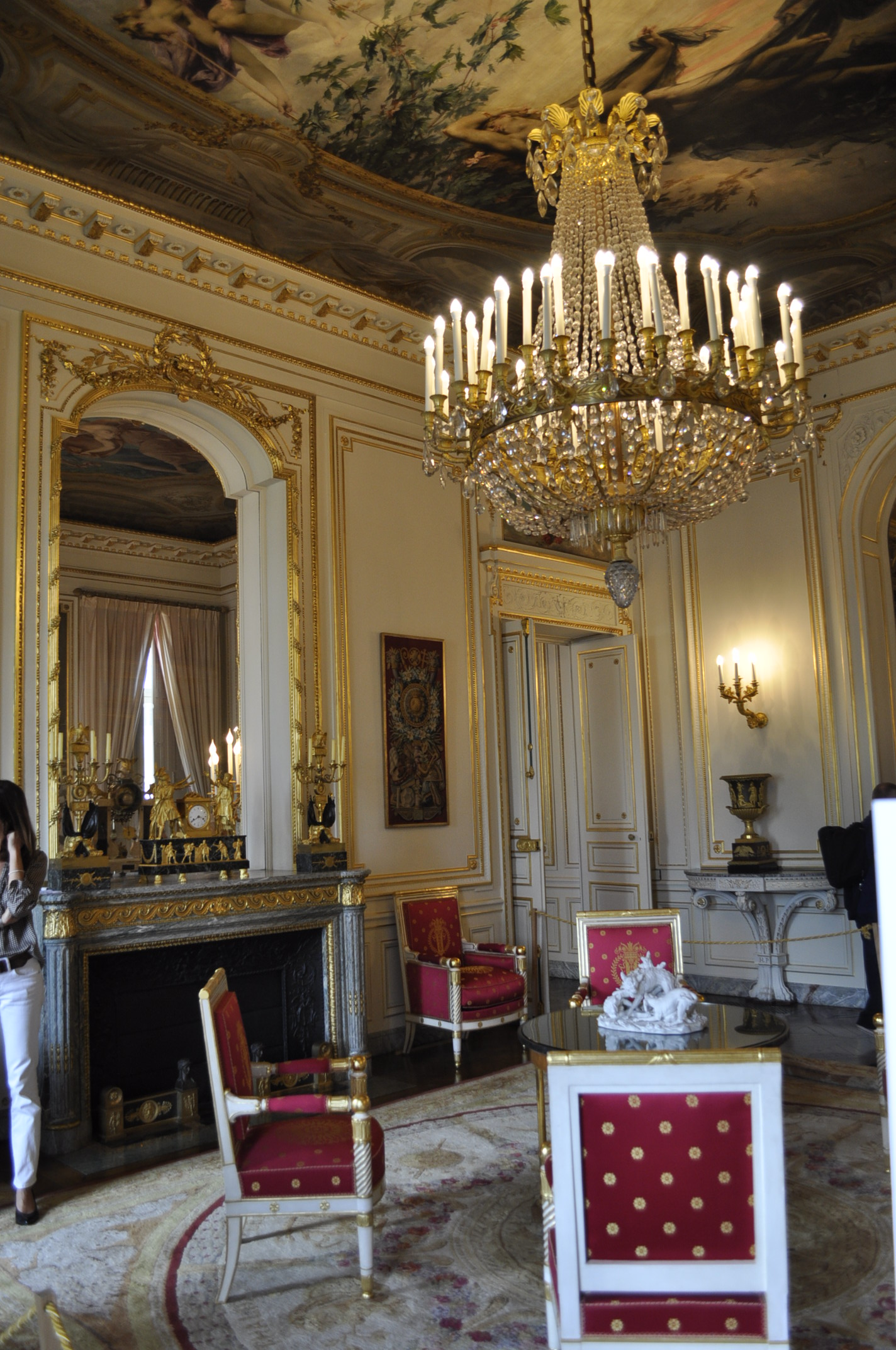 Salon de l'aurore, à l'hôtel de Salm, au VIIeme arrondissement de Paris. La pendule Premier Empire représente le serment des Horaces. Les chaises et fauteuils sont dus à Pierre-Antoine Bellangé. Photo prise lors des journées européennes du patrimoine de 2014.